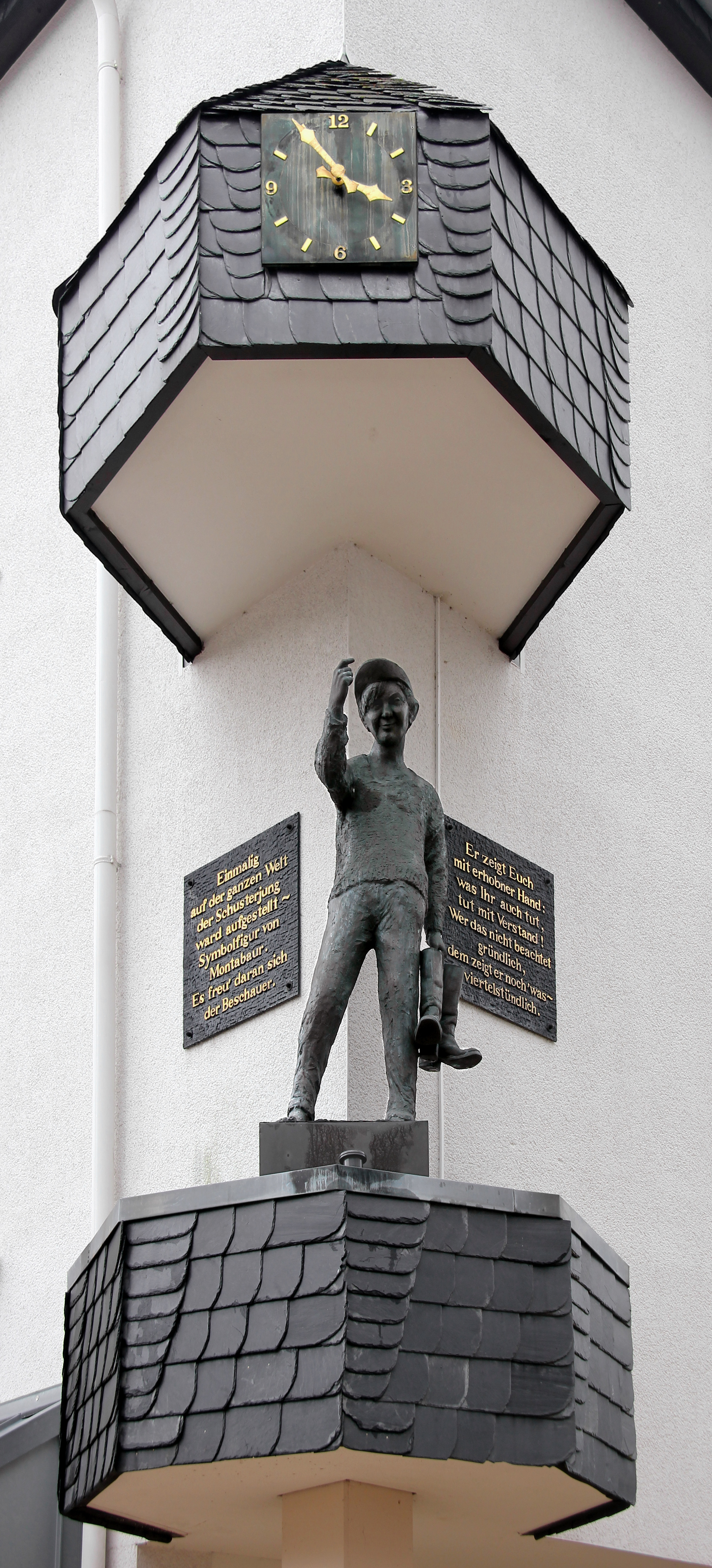 Schusterjunge, Bronzeskulptur von Ernemann Sander (* 1925) und Symbolfigur in Montabaur gegenüber dem Rathaus zur Erinnerung an das Schuhmacherhandwerk in der Stadt, dem die Bürger ihren Spitznamen zu verdanken haben. Stifter der Figur ist der Kaufmann Günther Holly aus Untershausen. Feierlich enthüllt wurde sie am 1. Juni 1985.